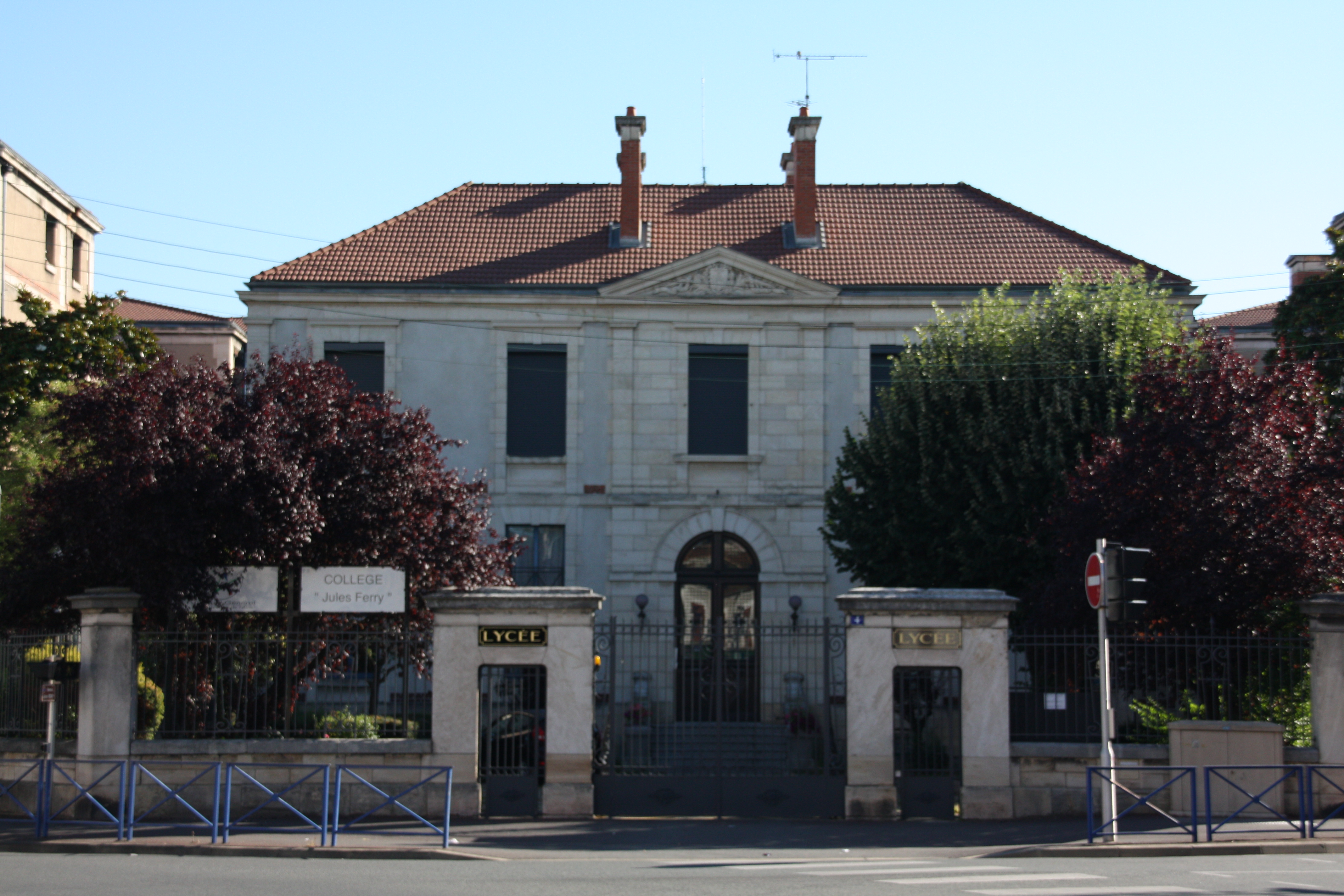 Bâtiments de Montluçon France